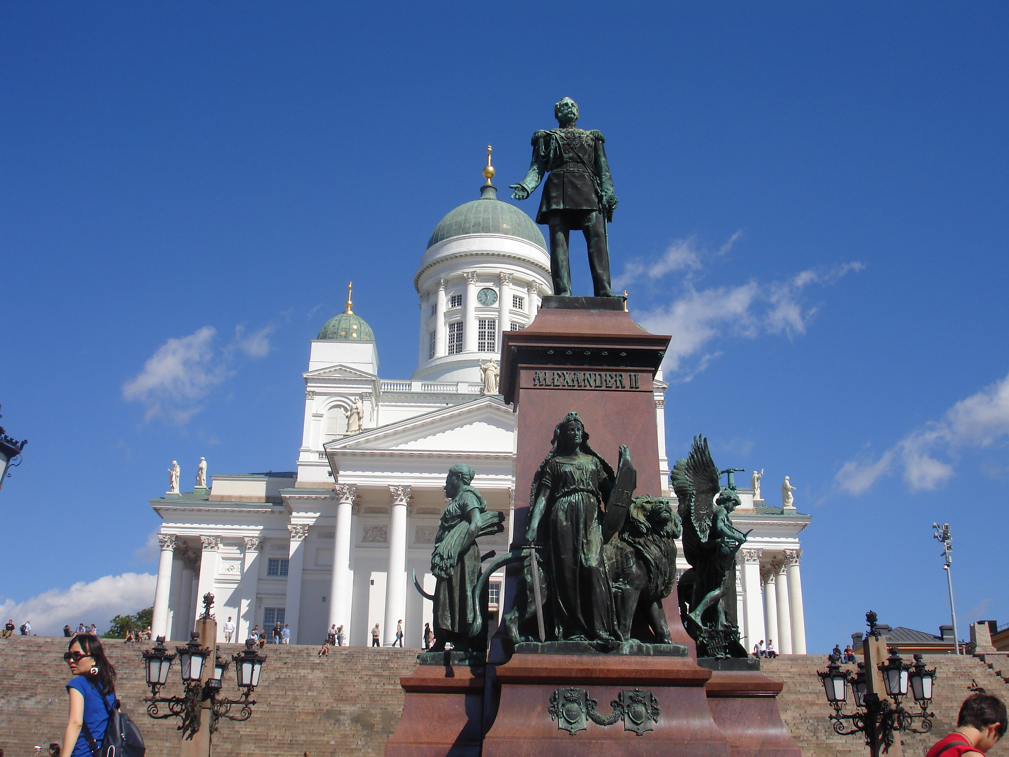 00101 Helsinki, Finland